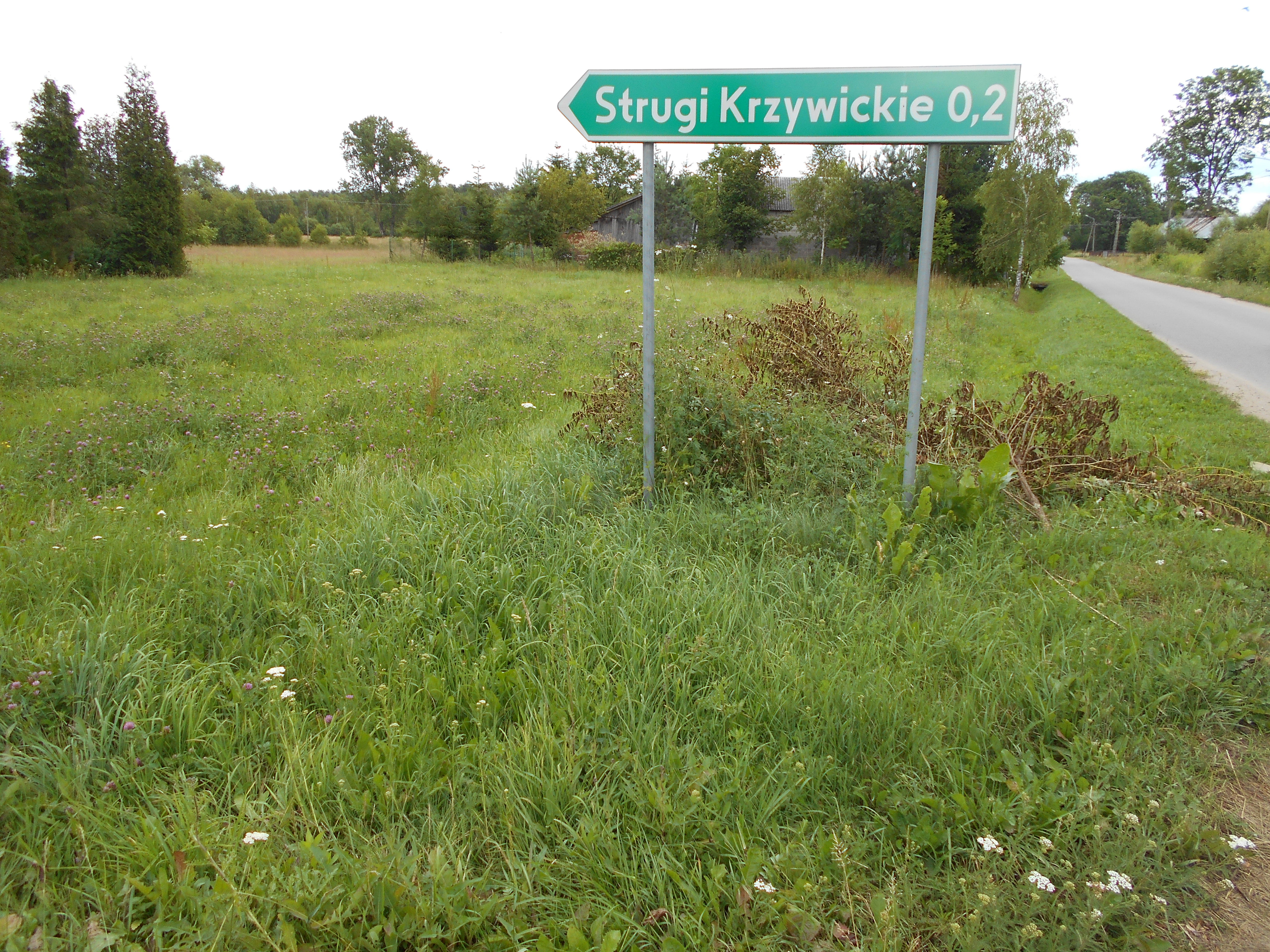 Miejscowość w gminie Siennica